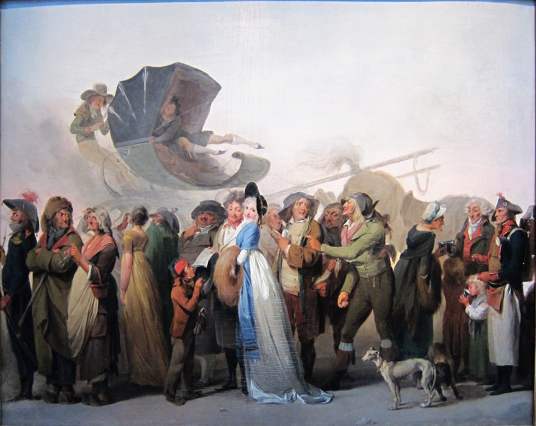 L'incroyable parade (collection particulière)